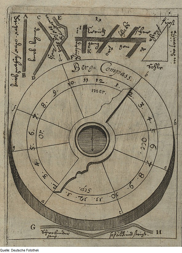 Original image description from the Deutsche Fotothek Bergbau & Bergkompass